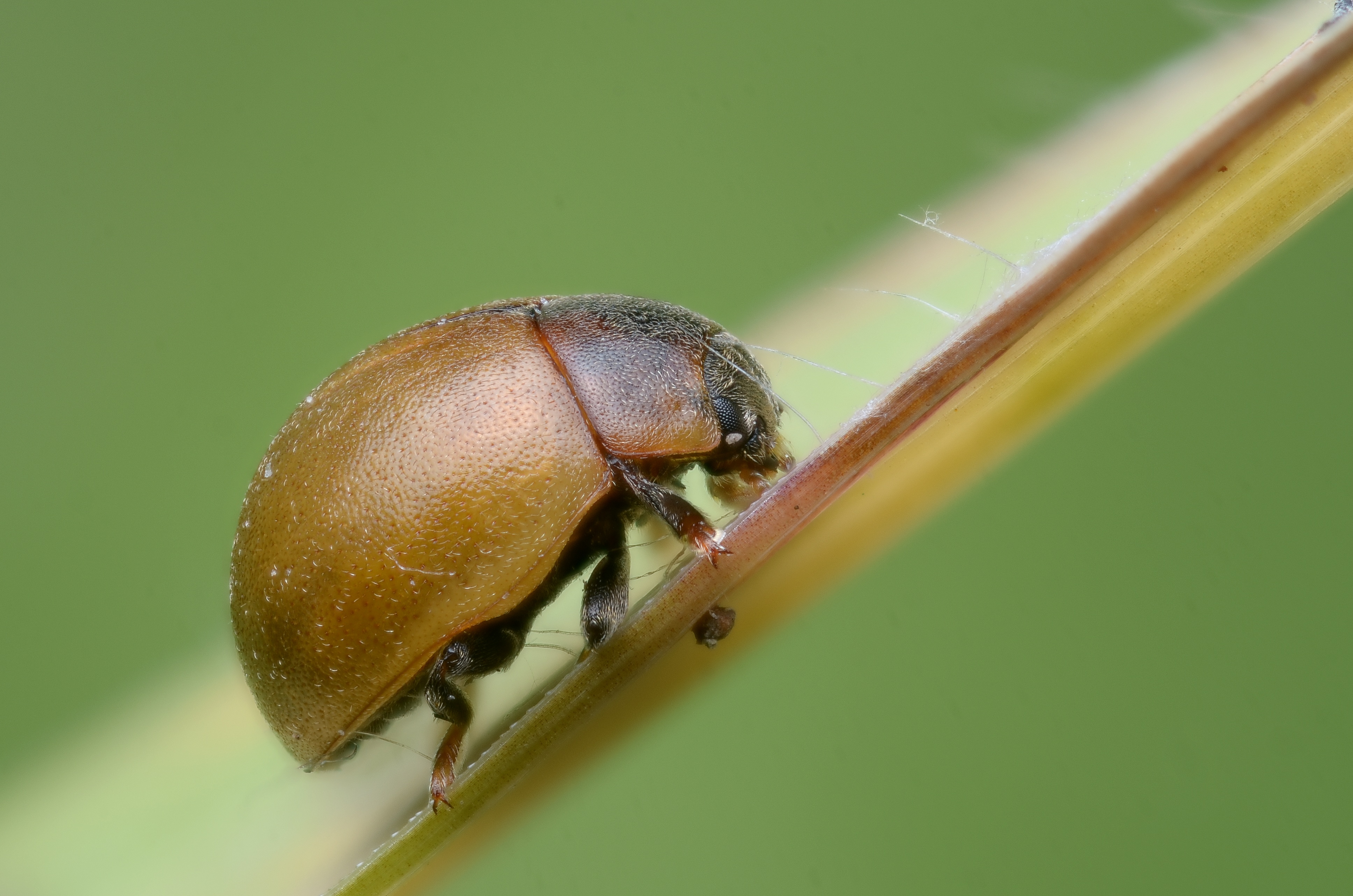 Cynegetis impunctata